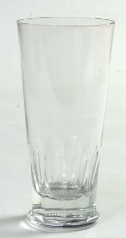 Pjolterglass. Tidligere eiere kjøpe det de giftet seg i 1905. Høyde 16.5 cm. Norsk Folkemuseum. NF.1955-1280. Foto: Anne-Lise Reinsfelt.